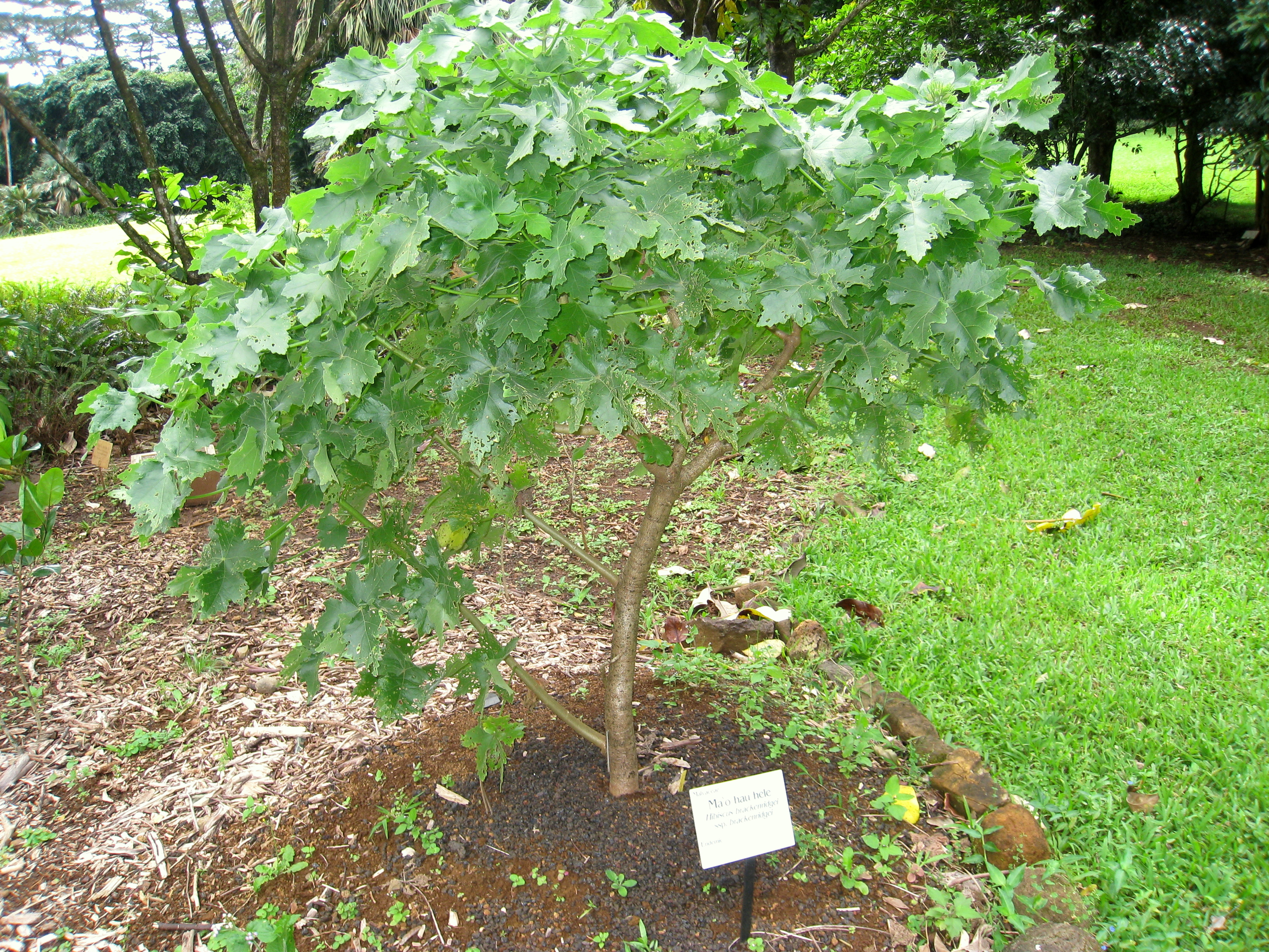 Hibiscus brackenridgei in Lyon Arboretum, Hawaii, USA.